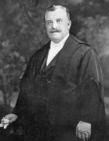 Joseph-Oscar Auger (1873-1942). Maire de Québec de 1928 à 1930.